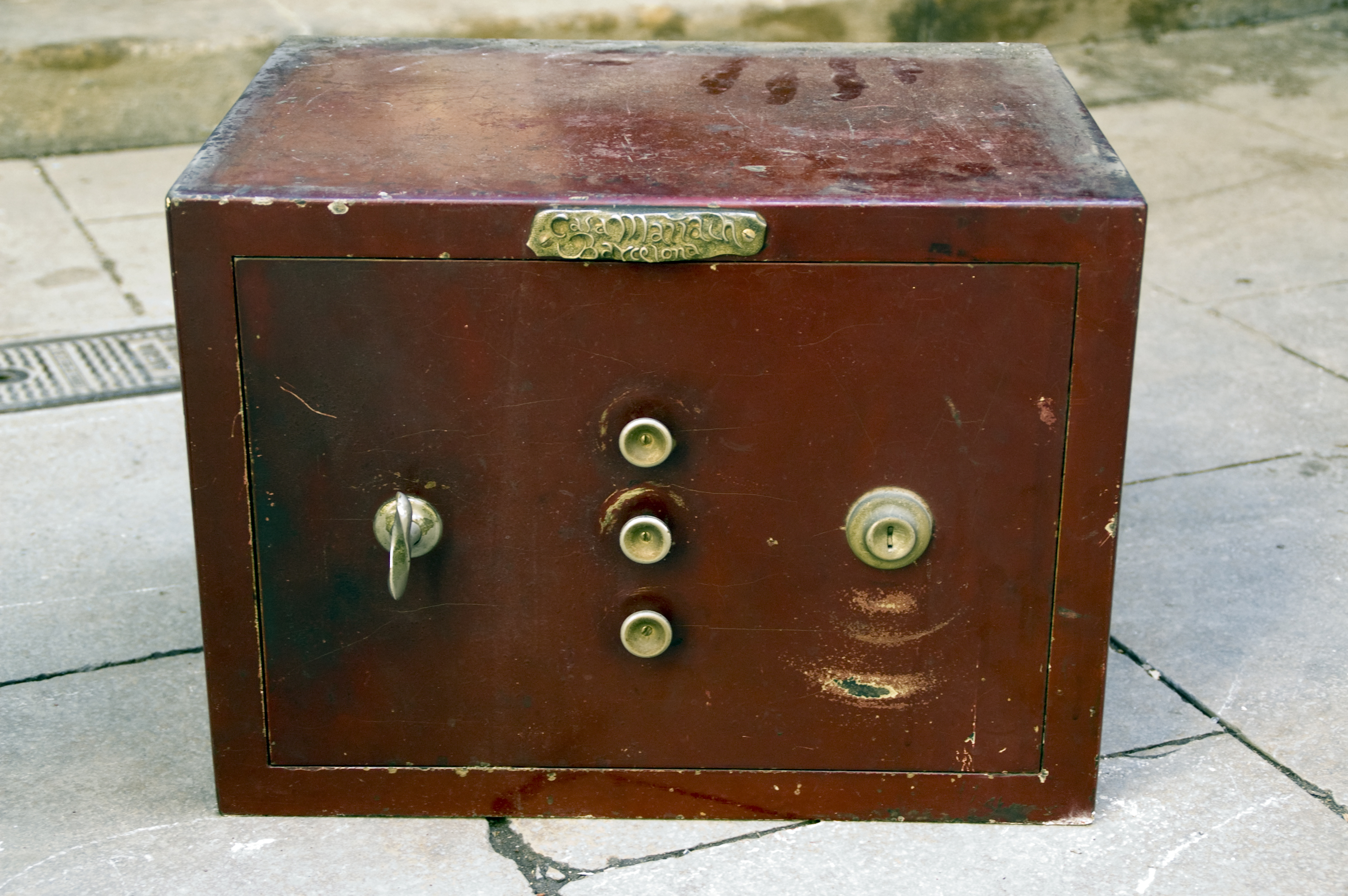 Mañach, caixa de cabals, caixa forta